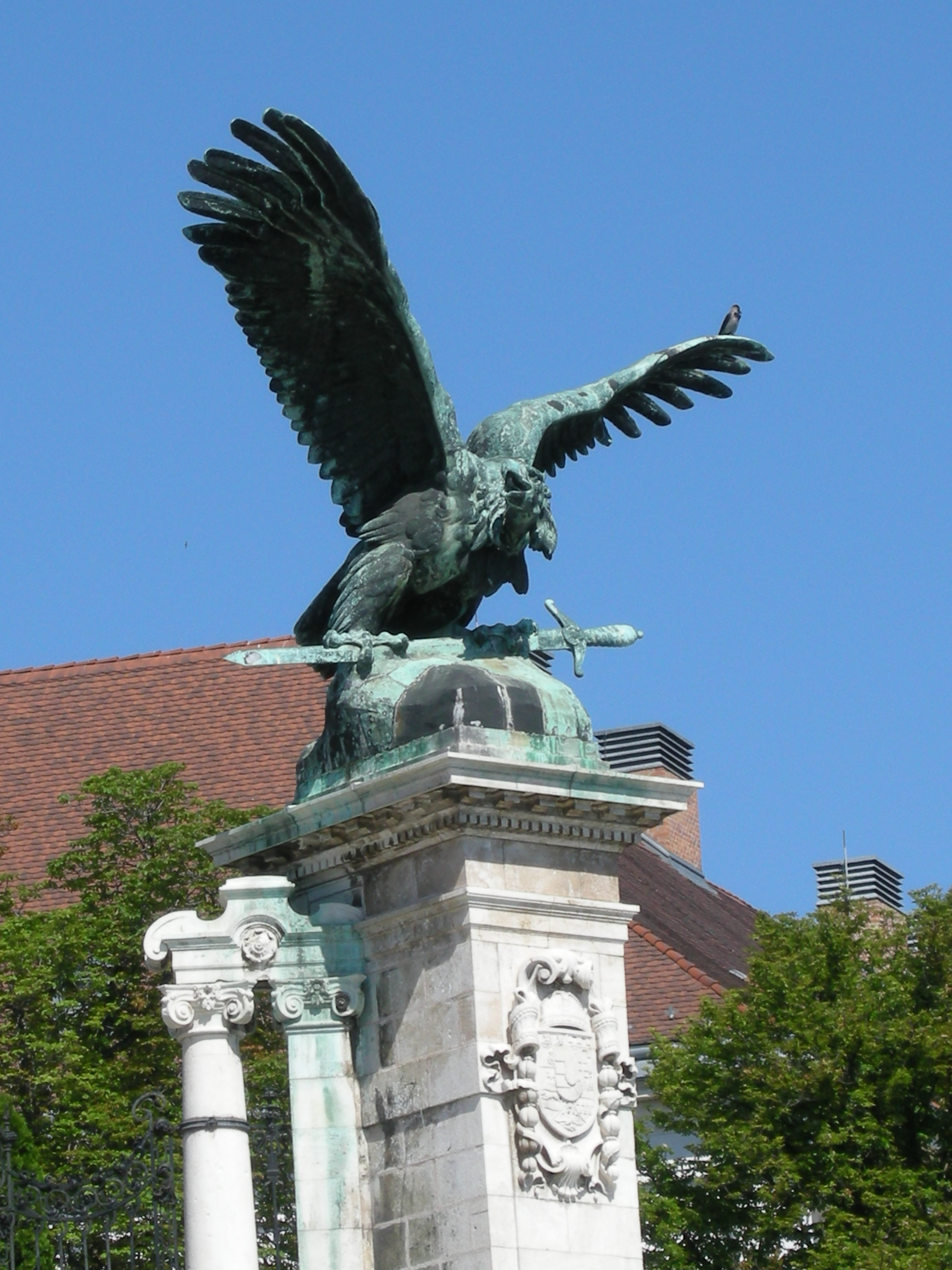 Budapest